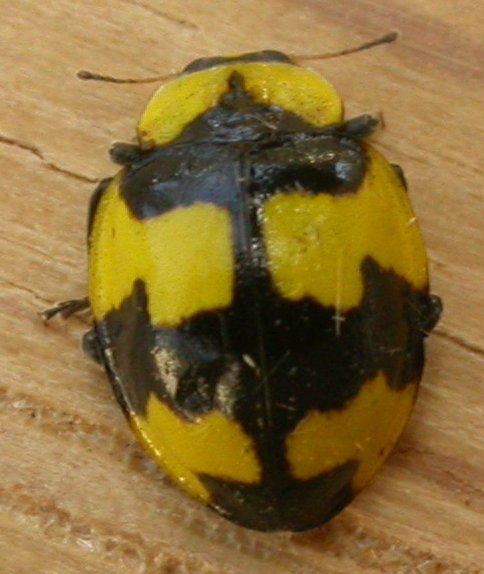 Illeis galbula (Mulsant), Aranda, ACT, 9 November 2008